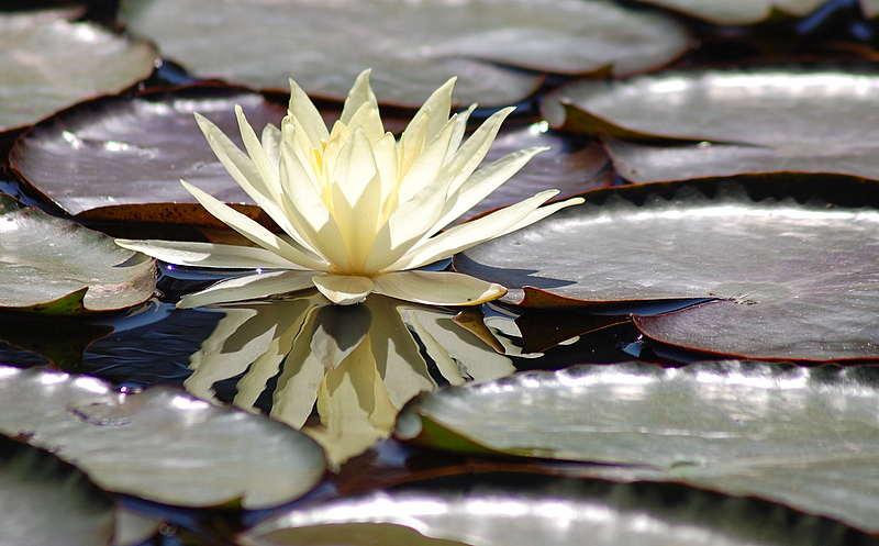 Jardim Botânico em São Paulo